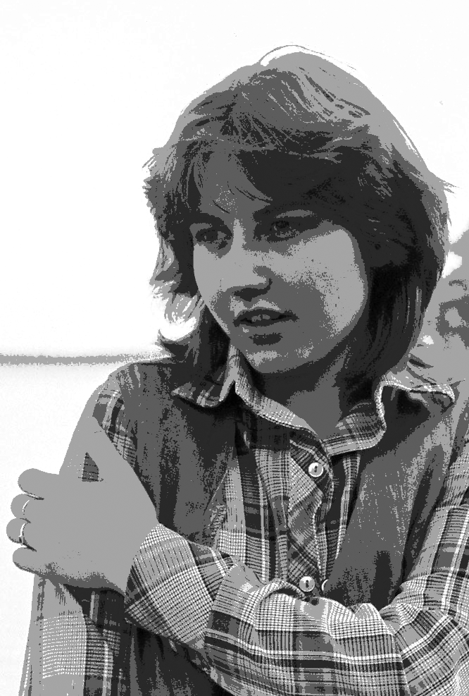 Simulation einer Isohelie